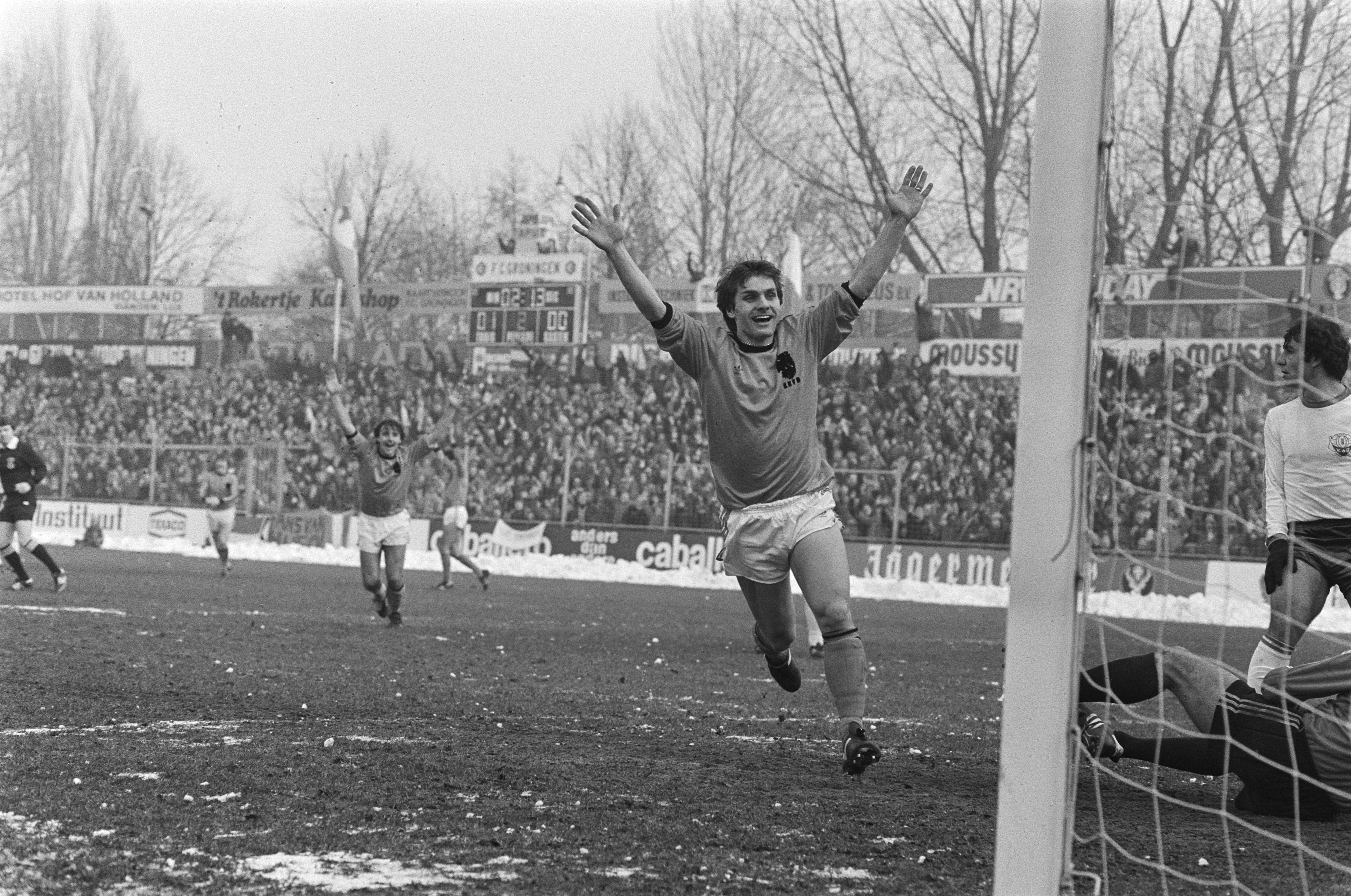 Match international de football Pays-Bas - Chypre (3-0) à Groningue, Cees Schapendonk exulte après avoir marqué le deuxième but néerlandais.